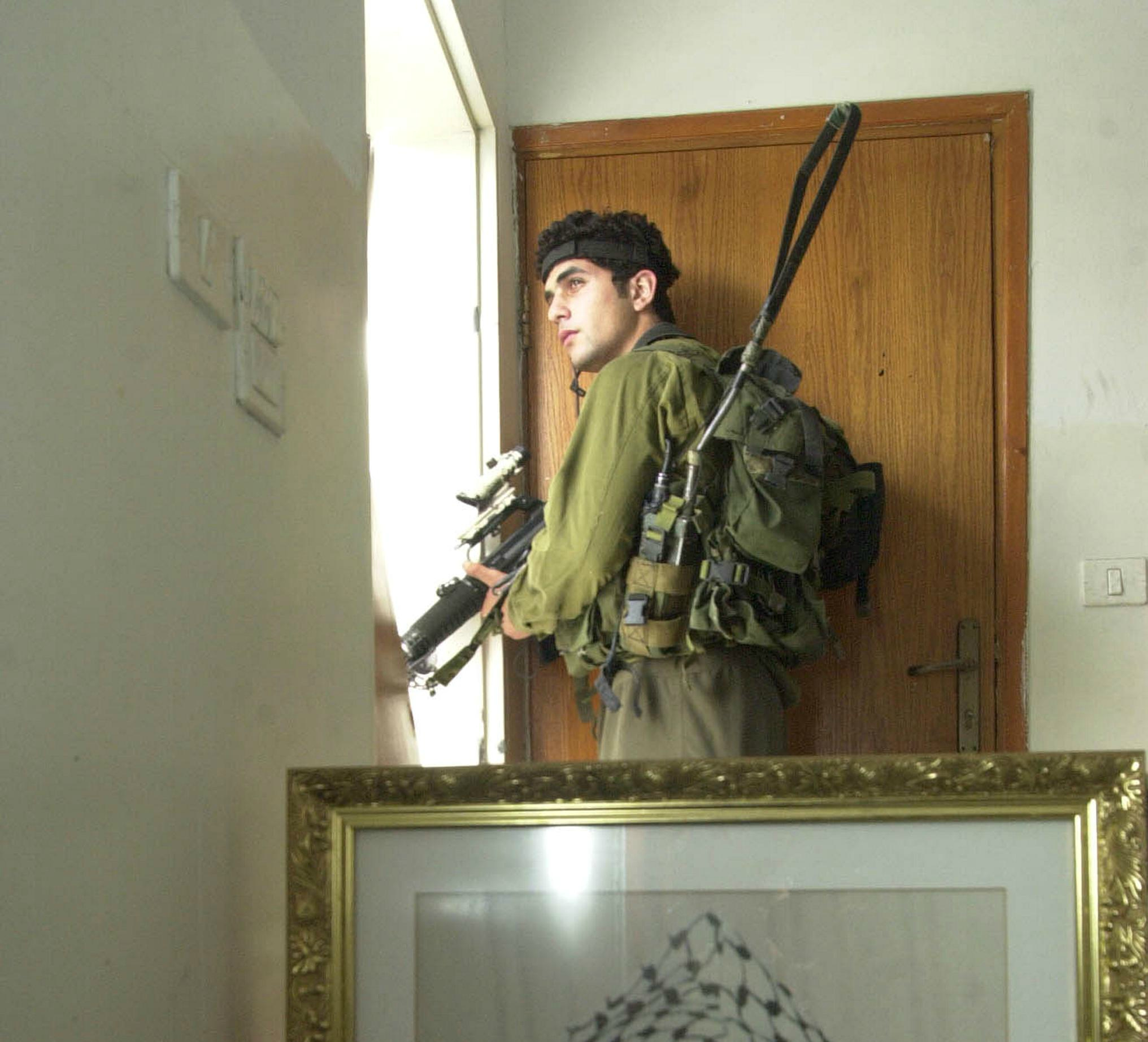 מבצע "חומת מגן" להריסת תשתיות הטרור ברשות הפלשתינית על ידי כוחות צה"ל. בצילום, חייל צה"ל בפעילות מבצעית בג'נין.